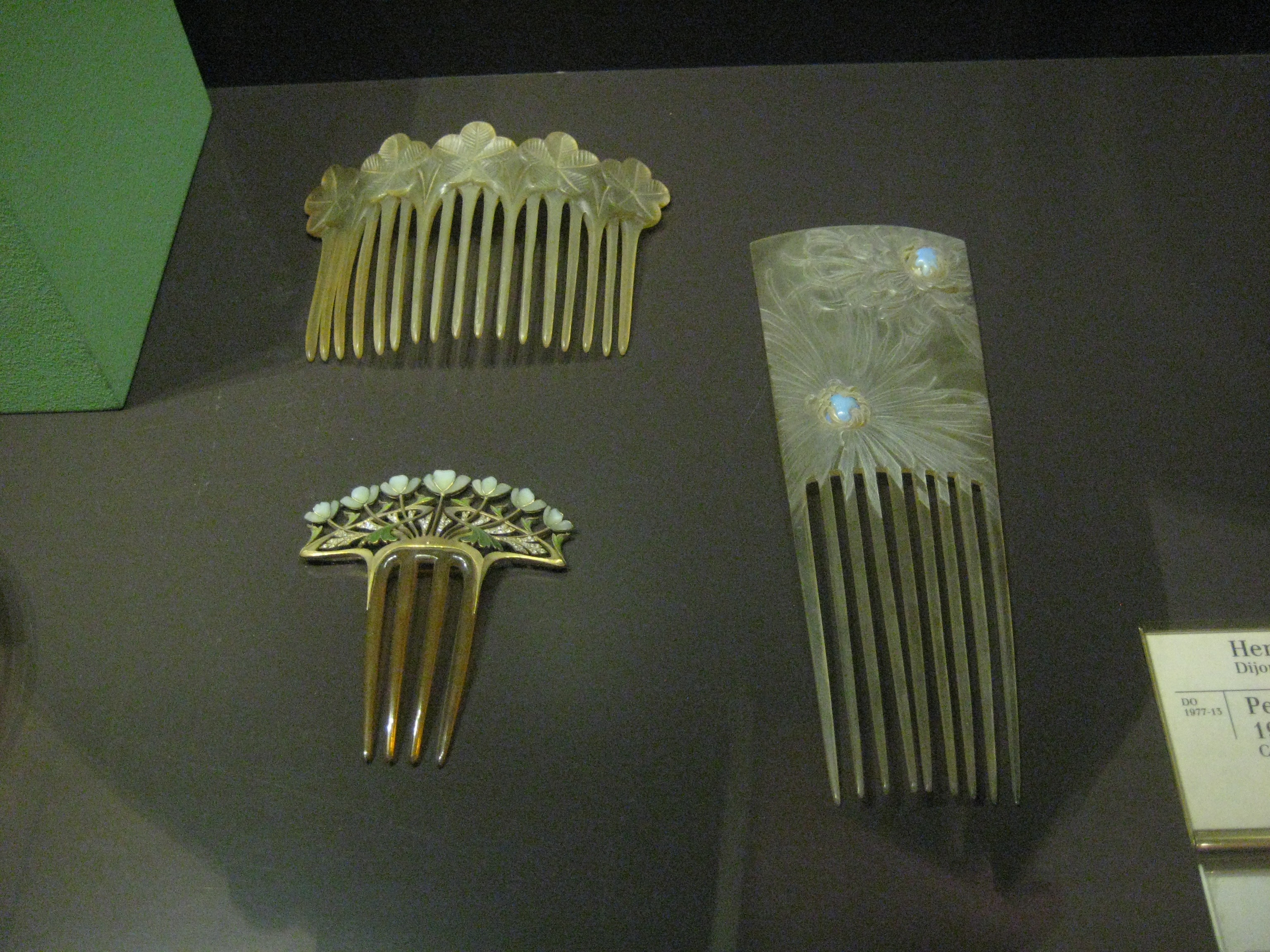 Drei Haarkämme